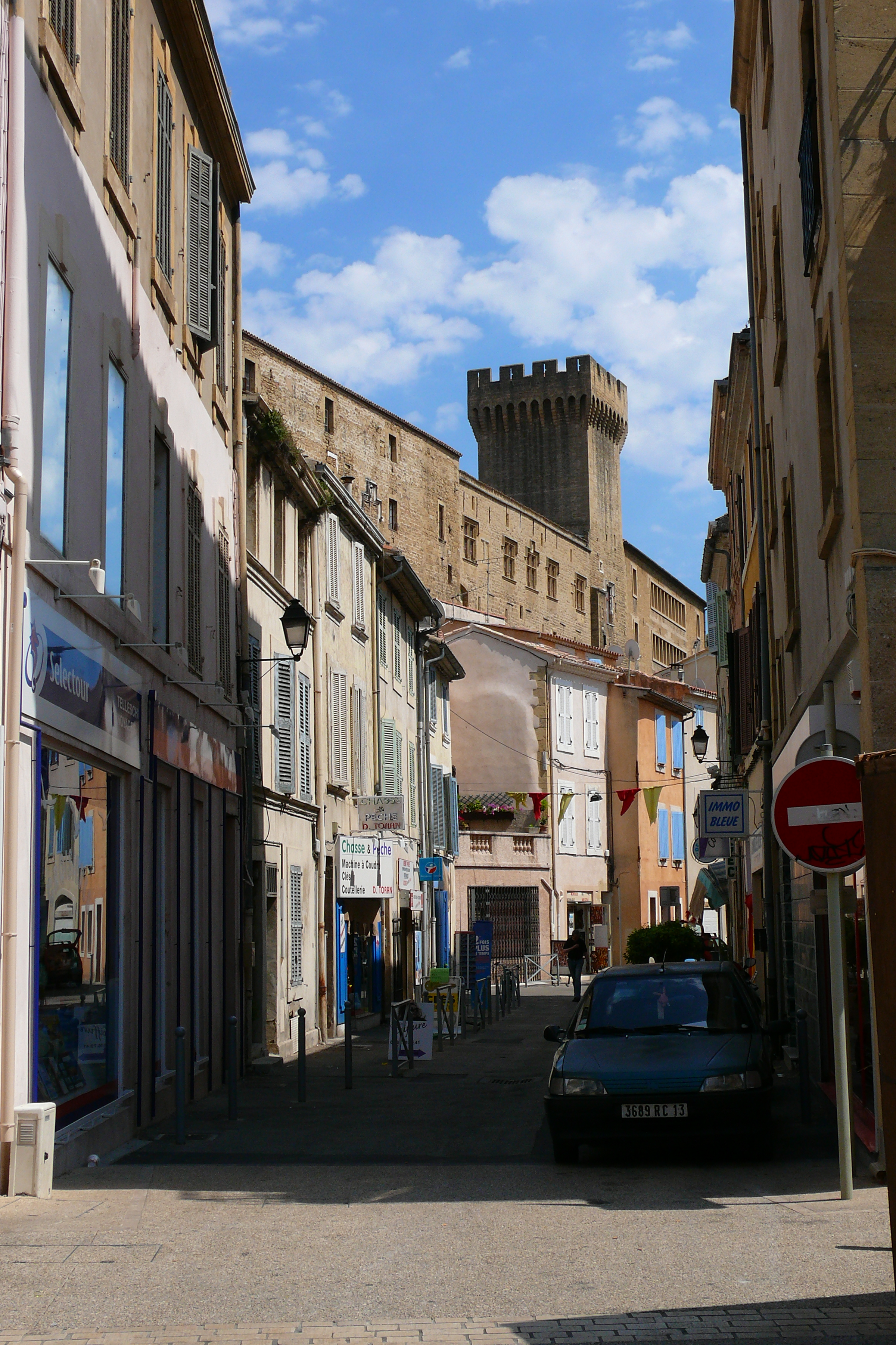 Der Turm von Bourg Neuf in Salon-de-Provence